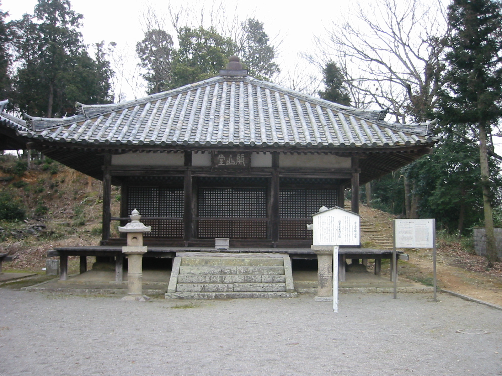 浄土寺 (小野市)